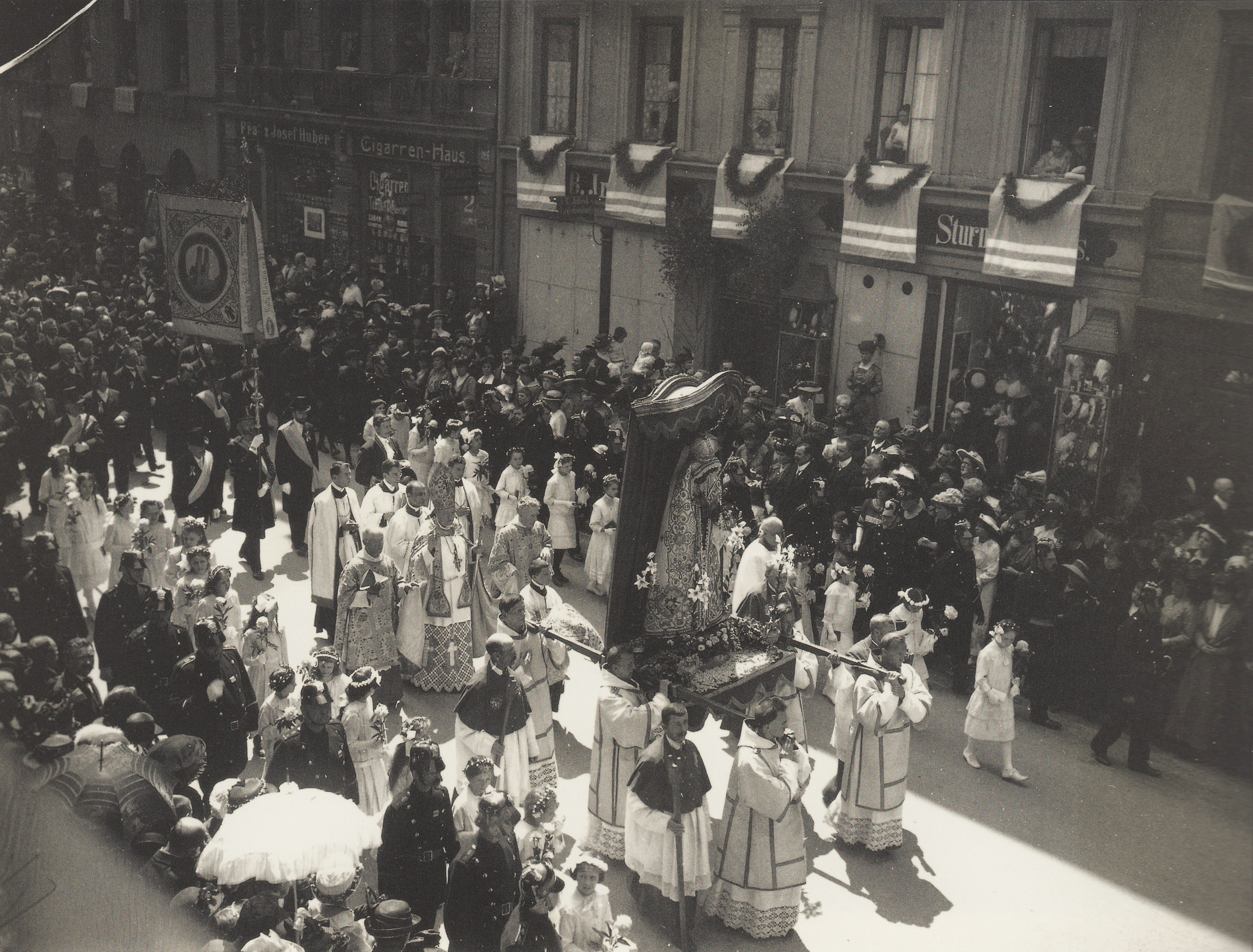 Fronleichnamsprozession in der Herzogspitalstraße (1915). Das erste Mal seit 1777 wurde das Gnadenbild der Schmerzhaften Muttergottes wieder durch München getragen. Anlass war eine Fürbitte um einen siegreichen Ausgang des Ersten Weltkriegs. Hinter dem Marienbild geht der Erzbischof von München-Freising, Franz von Bettinger